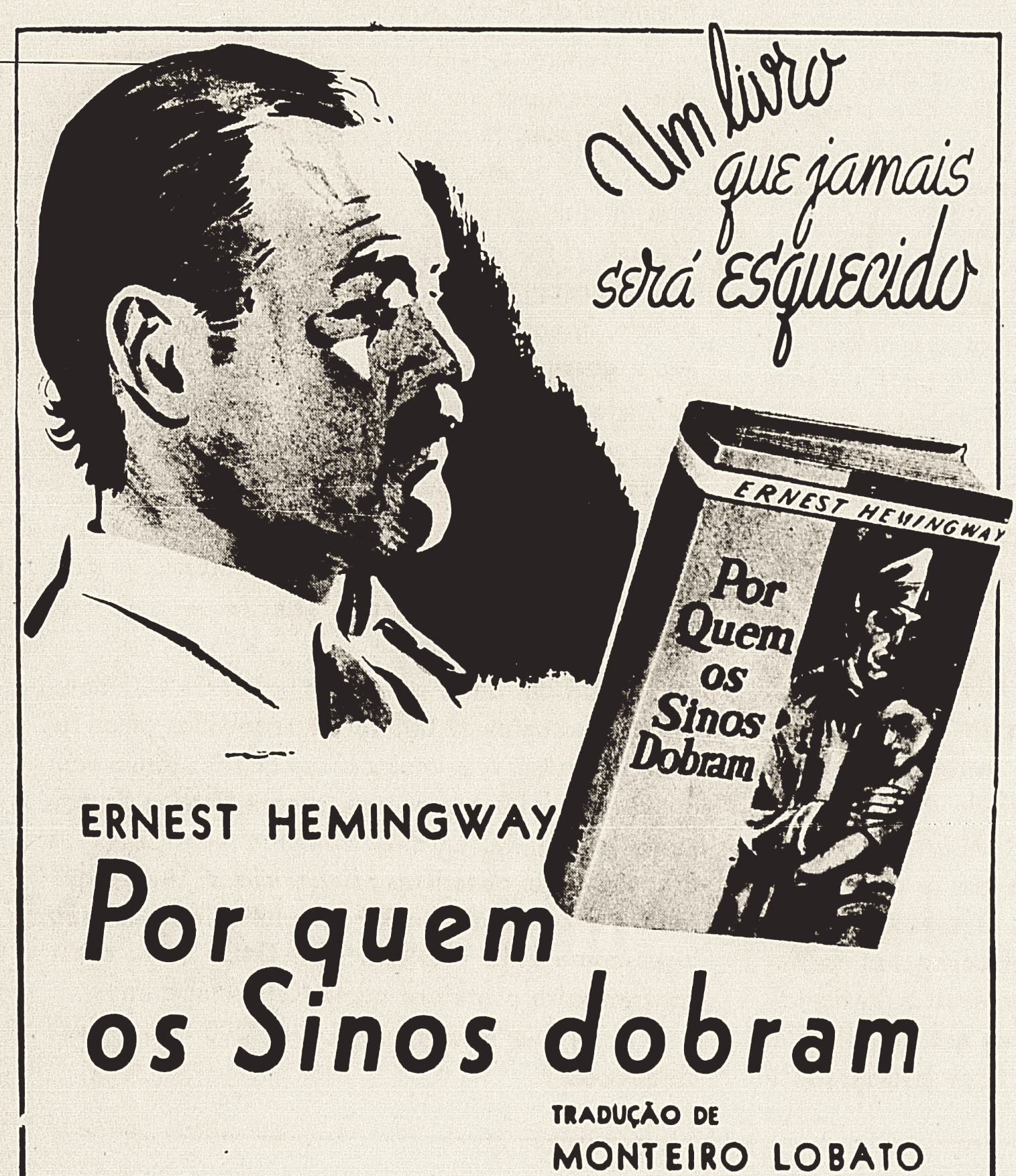 Anúncio brasileiro do livro de Ernest Hemingway, "Por quem os sinos dobram", tradução por Monteiro Lobato e editado pela Companhia Editora Nacional.